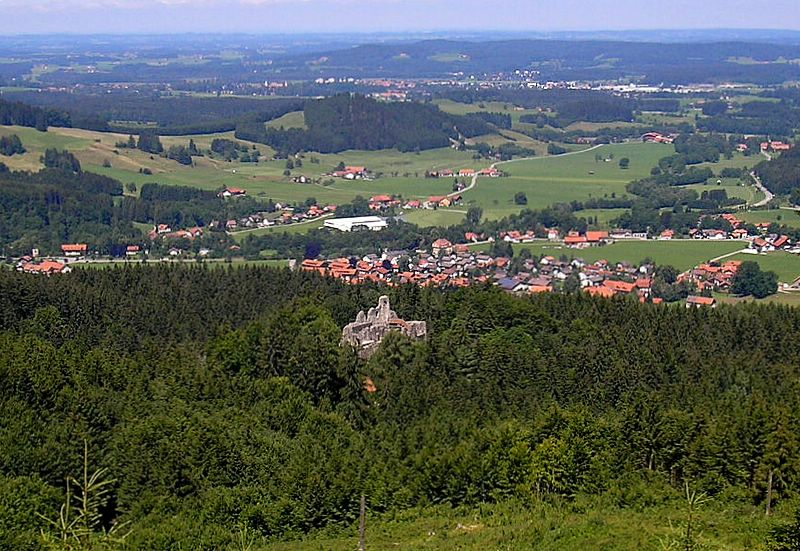 Burg Alttrauchburg (Markt Weitnau, Landkreis Oberallgäu, Bayerisch-Schwaben). Ansicht von Süden. Eigene Aufnahme, Juli 2007 / Alttrauchburg castle near Weitnau(Bavaria, Germany). Total view from the south. Own photo, July 2007